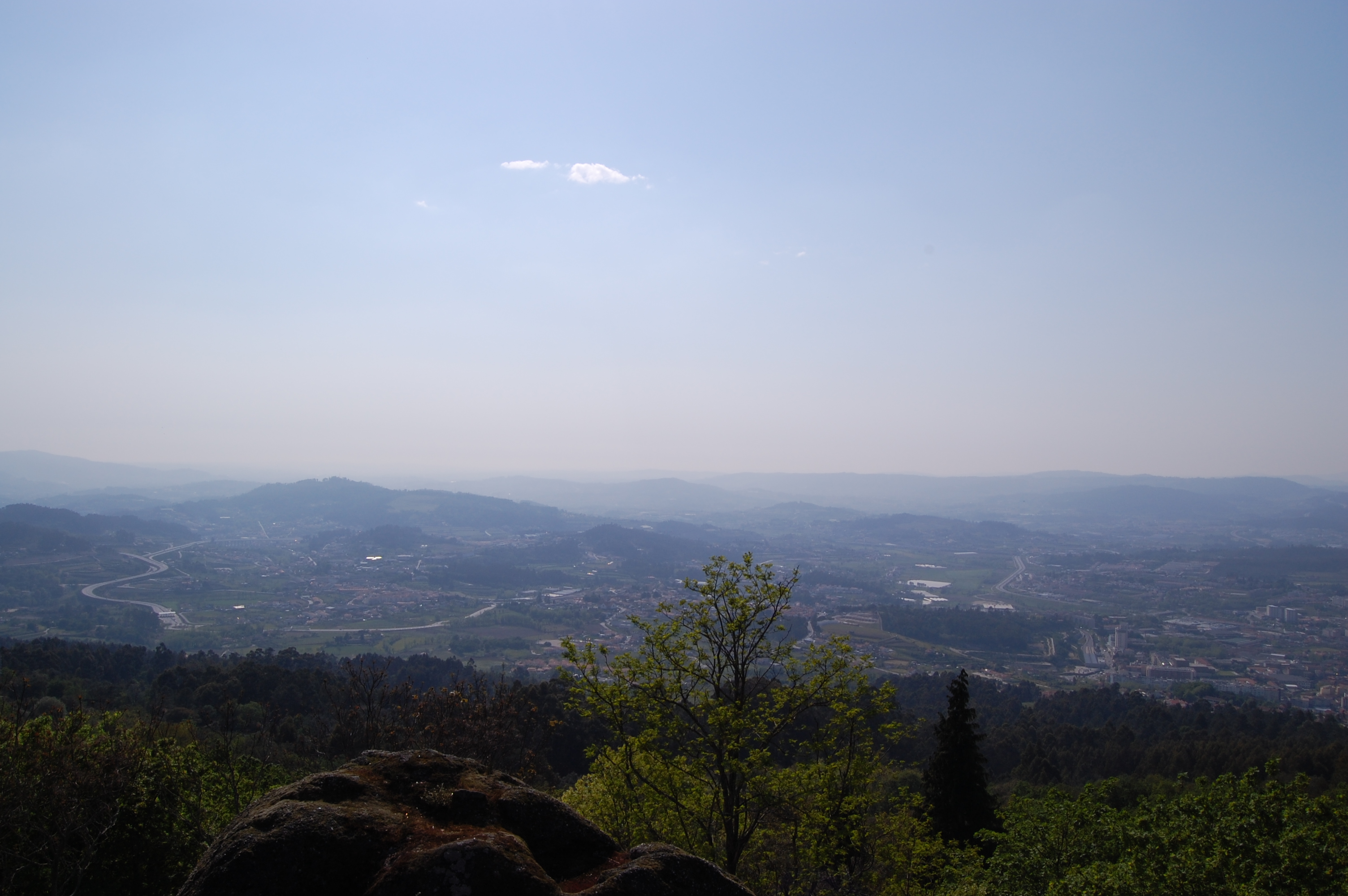 A cidade de Guimarães (distrito de Braga, noroeste de Portugal.